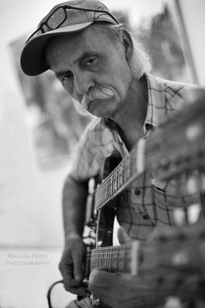 Cziránku Sándor magyar gitáros.